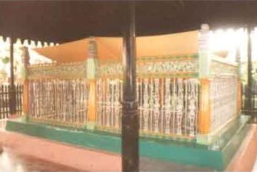 Hasil scan photo dari hasil pemotretan sendiri